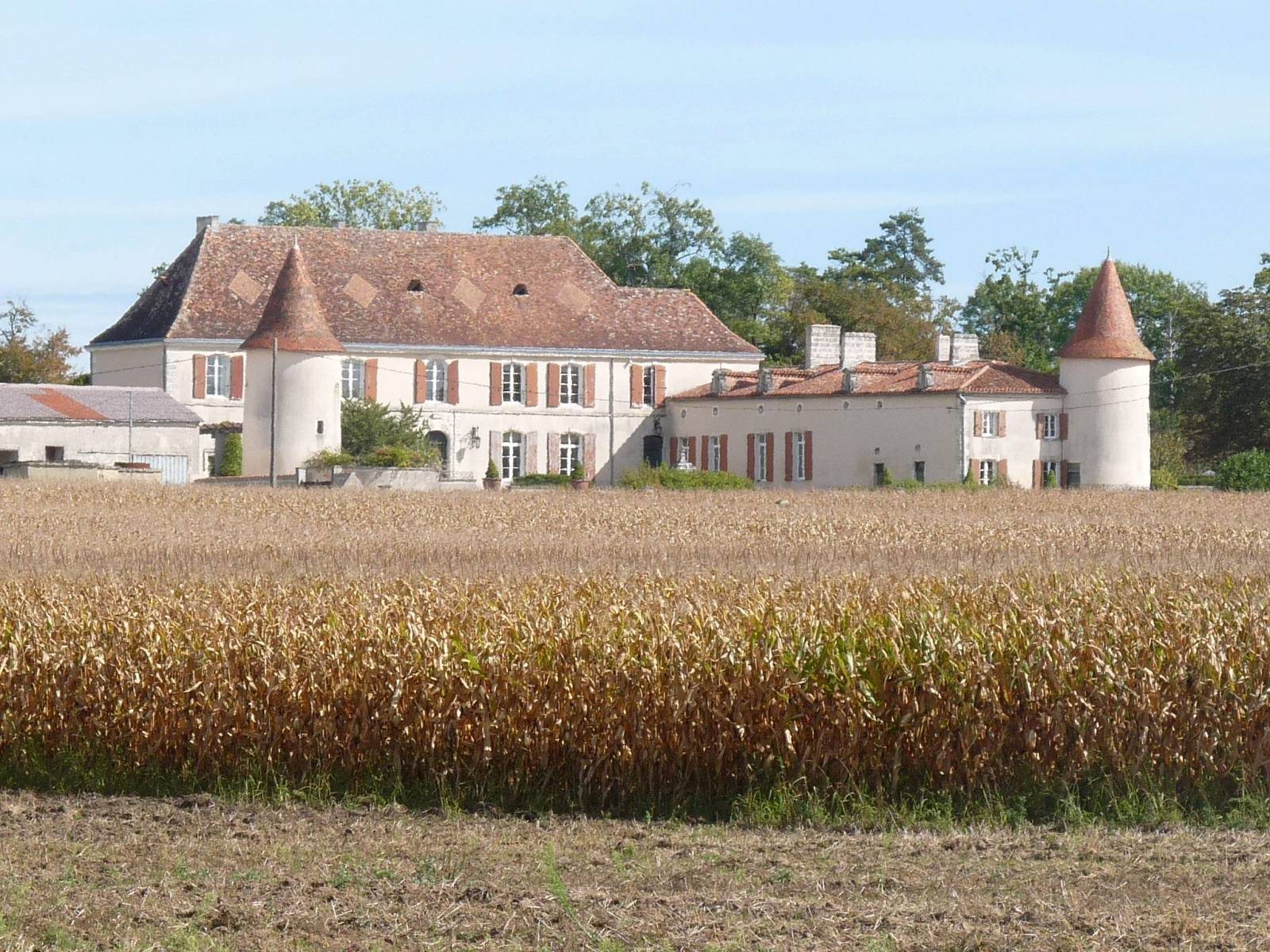 château du Bourbet, Cherval, Dordogne, France